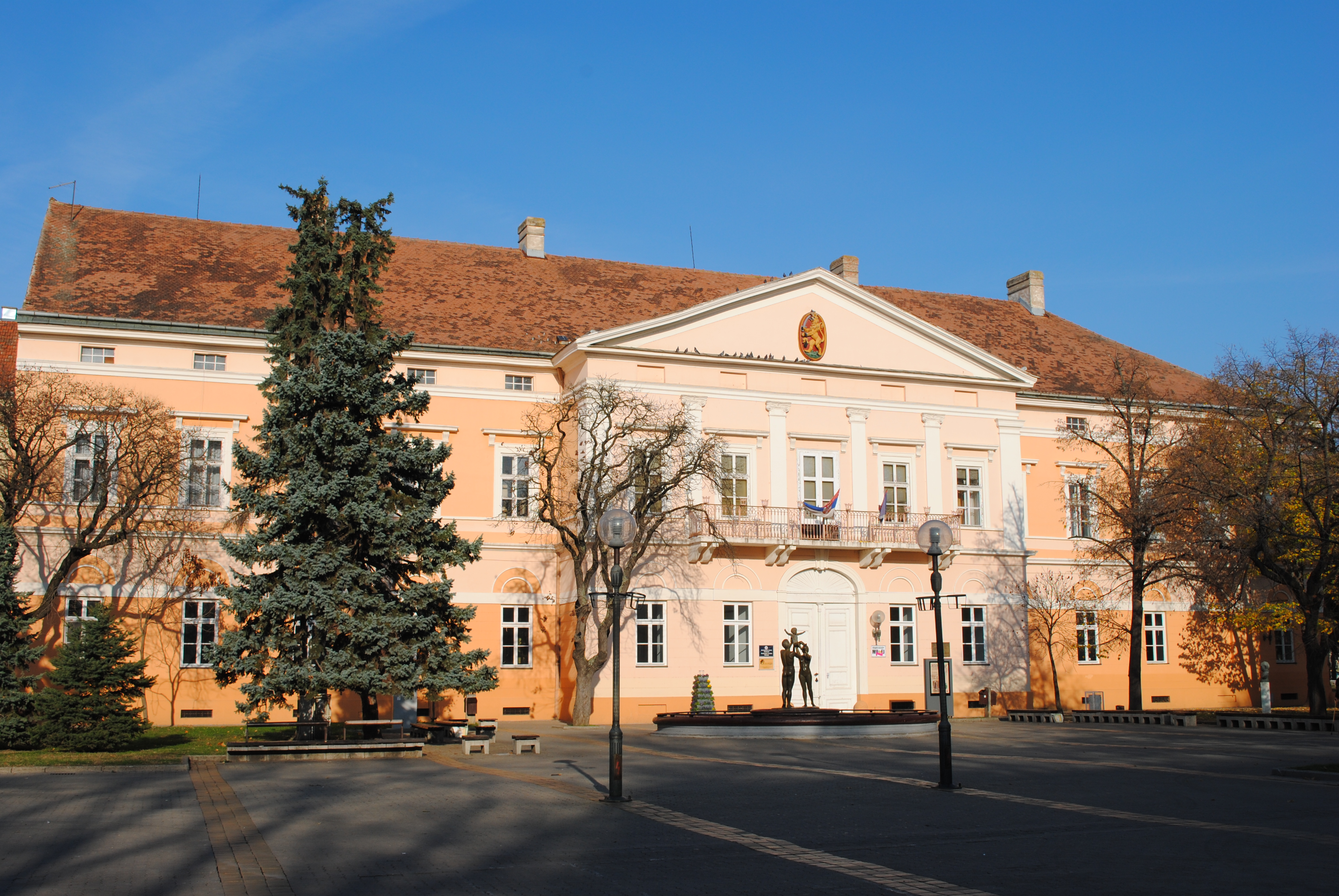 Srpski (latinica): Zgrada Velikokikindskog dištrikta u kojoj se danas nalaze Narodni muzej i Arhiv. Zgrada je spomenik kulture od velikog značaja (SK 1106)